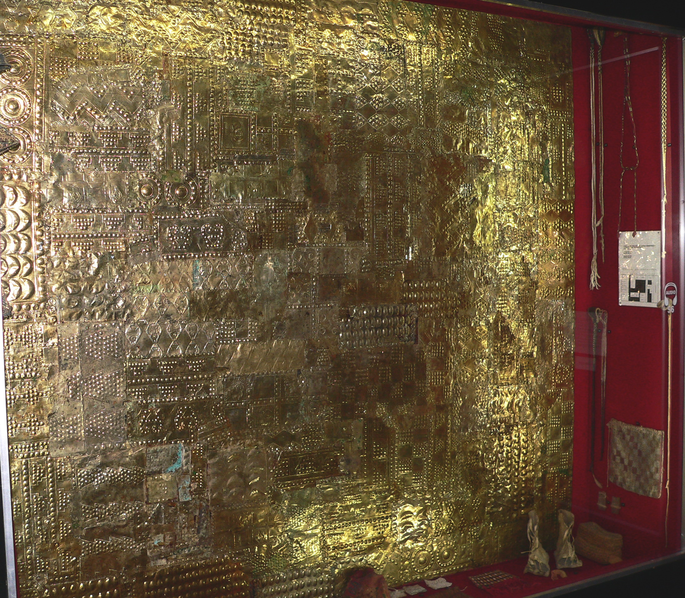 Descripción:Gruesa lámina de oro para revestimiento de muro Cultura: Inca Fundación: Fundación Miguel Mujica Gallo Museo: Museo Oro del Perú y Armas del Mundo Lugar: Lima, Perú Fotógrafo: © Manuel González Olaechea y Franco Fecha : 13 de julio de 2007